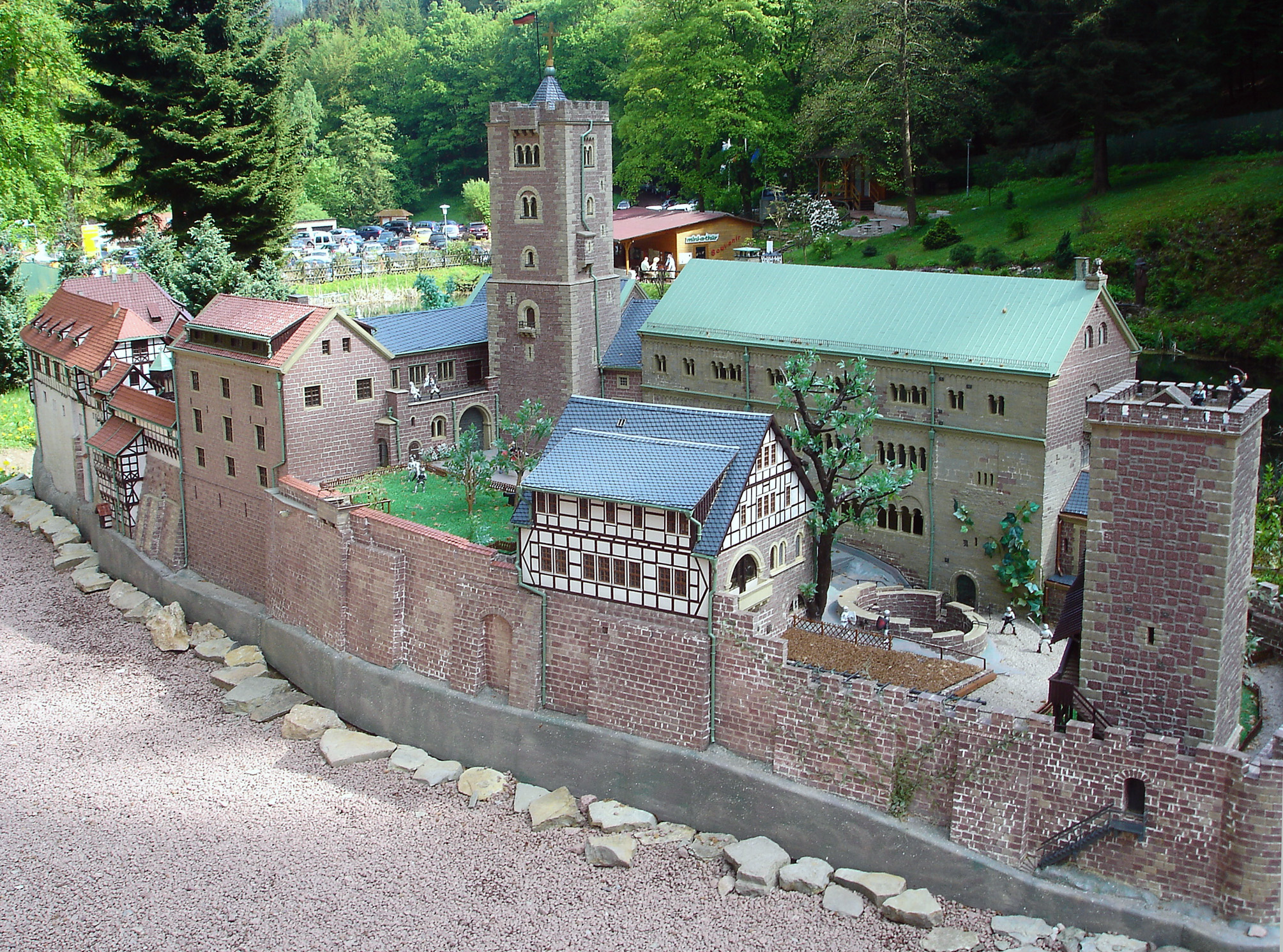 Modell der Wartburg im mini-a-thür Ruhla